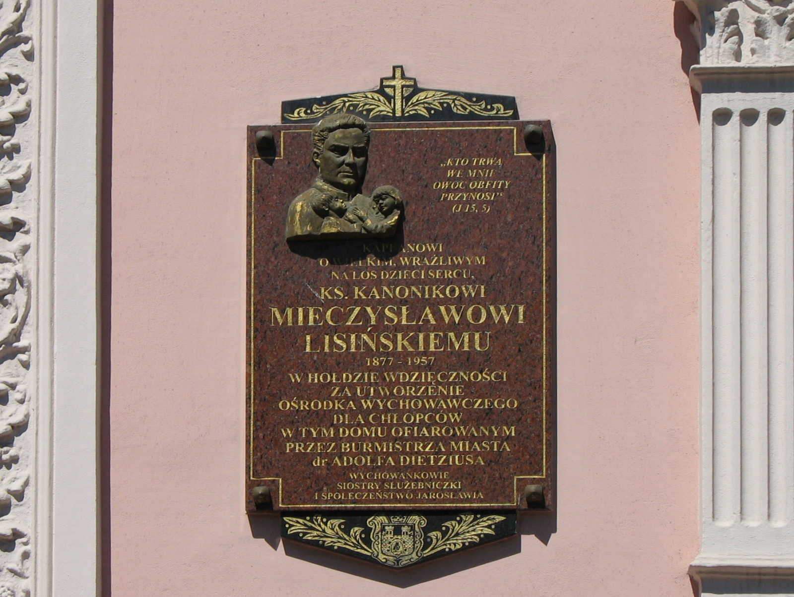 Jarosław (Poland), Ośrodek Wychowawczy ks. Lisińskiego